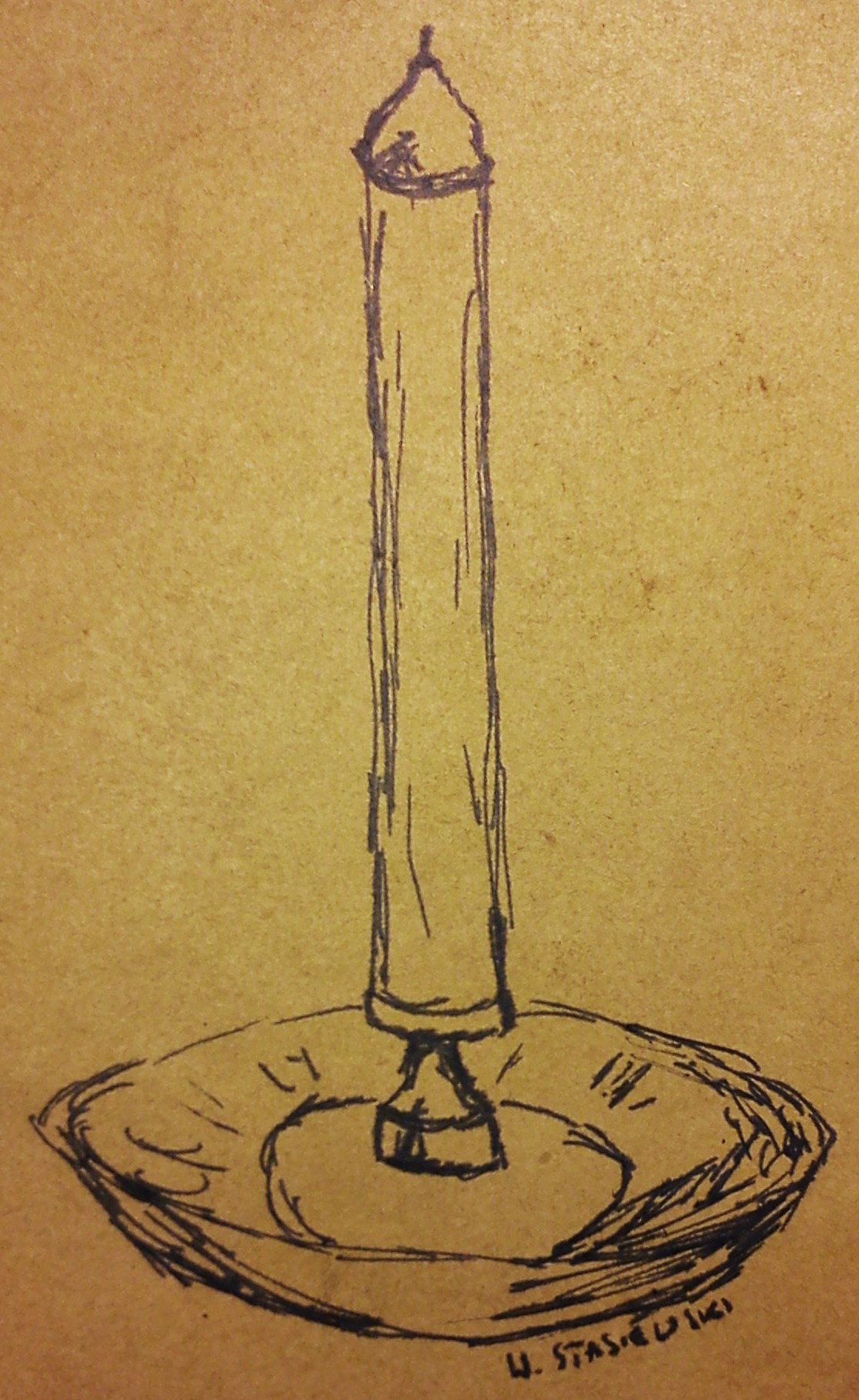 Świeca benzynowa. Rysunek na podstawie książki Jerzy Wiesław Hołubiec, Polskie lampy i świeczniki, Ossolineum, Wrocław-Warszawa-Kraków, 1990, s.131, ISBN 83-04-02227-3